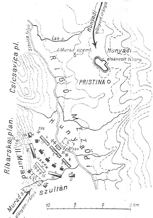 Битва на Косовом поле (1448), 17-18 октября Армия Хуньяди: 1. Правое крыло, Бенедикт Лозонч 2. Центр, Янош Секеш 3. Левое крыло, Иштван Банфи и Дан 4. Пехота и артиллерия 5. Резерв, Ференца Таллочи 6. Фургоны Армия султана Мурада: I) Азапы II) Акынджи с флангов III) Правое крыло, кавалерия Анатолии IV) Центр, Пехота и артиллерия V) Левое крыло, Кавалерия Румелии VI) Ставка • хххх валы, верблюды, линия щитов